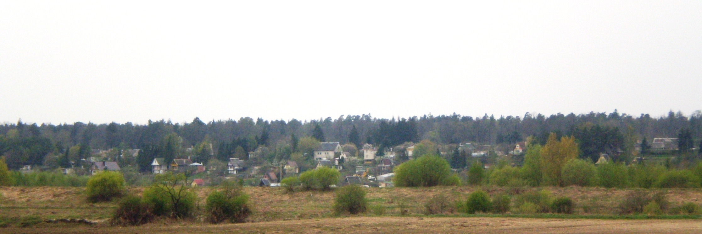 Justinava, Kėdainių raj.